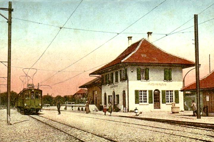 Postkarte der Station Bätterkinden der Elektrischen Schmalspurbahn Solothurn-Bern (ESB) im Jahre 1916.